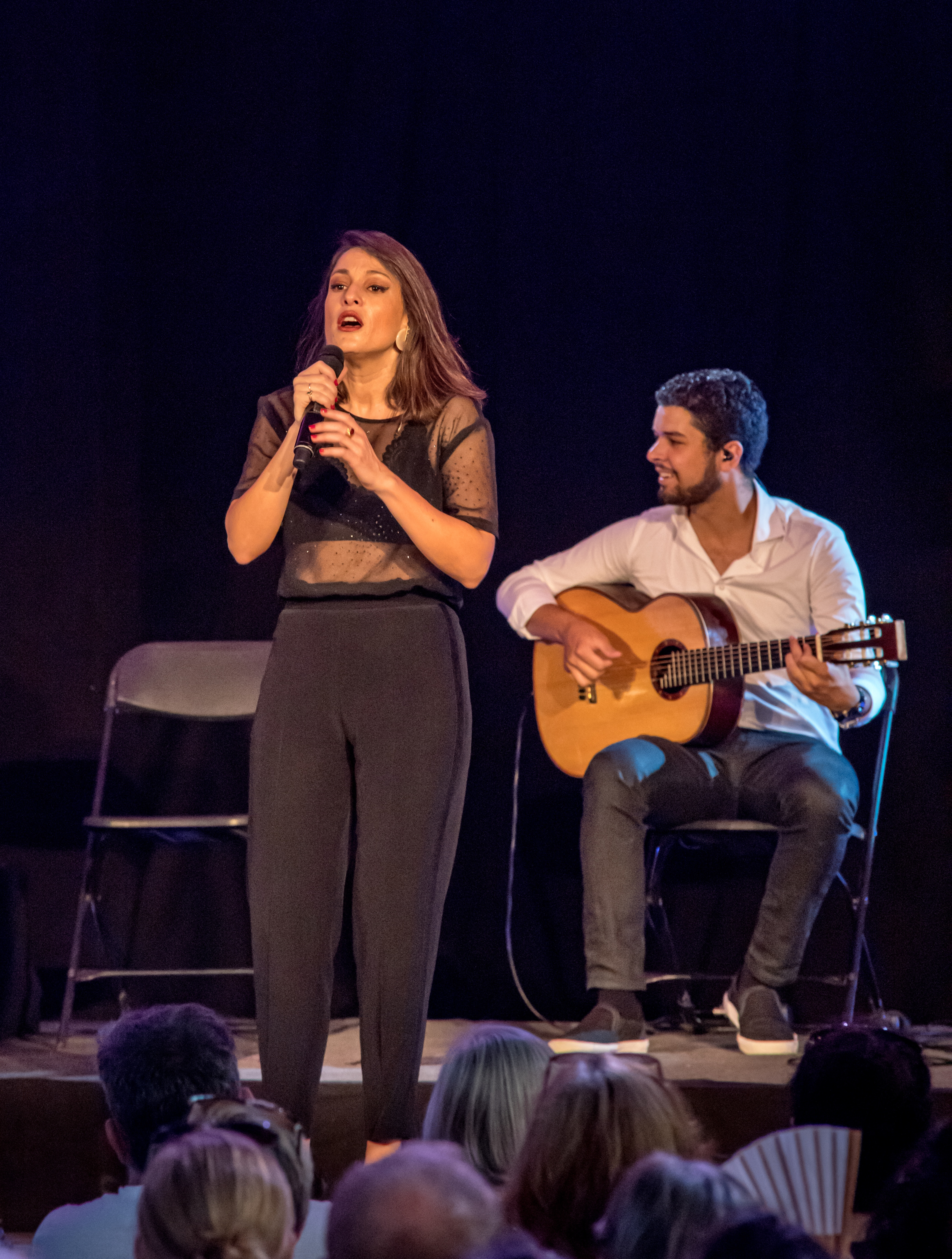 Bilder vom Zelt Musik Festival 2018 in Freiburg im Breisgau Auftritt Carminho am 24. Juli 2018 im Spiegelzelt